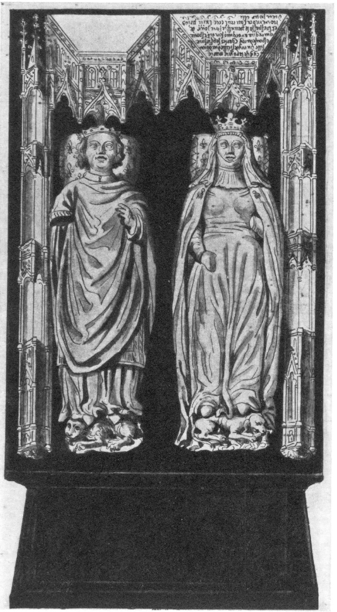 La chapelle caroline de Saint Jean-Baptiste, où étaient déjà inhumés Charles V et Charles VI, reçut les dépouilles de Charles VII en 1461 et de son épouse Marie d’Anjou en 1463. Leur tombeau, avec le traditionnel couple de gisants en marbre blanc sur un socle en marbre noir, ne nous est connu que par des dessins et gravures.